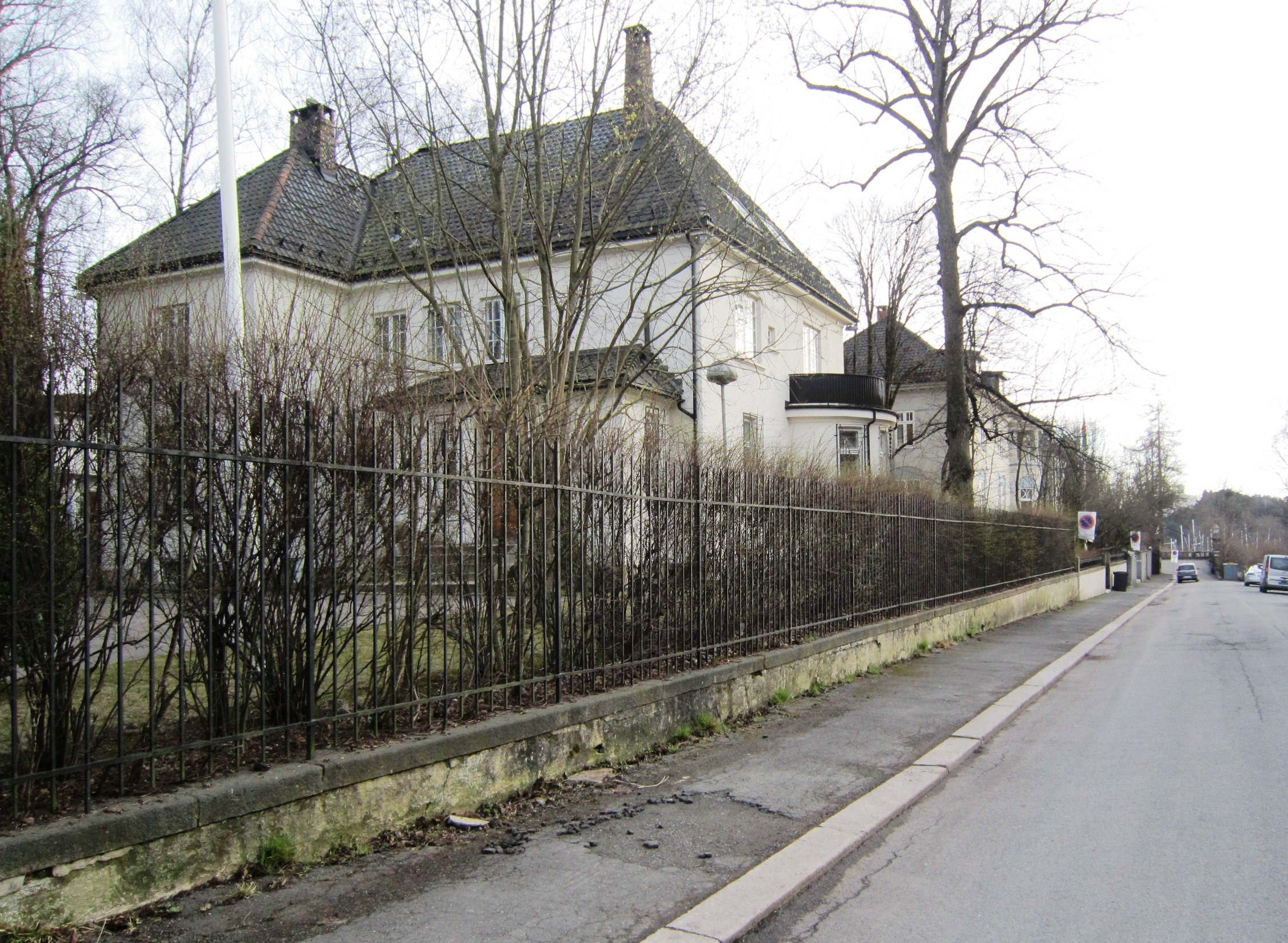 Gange-Rolvs gate på Skarpsno i Oslo